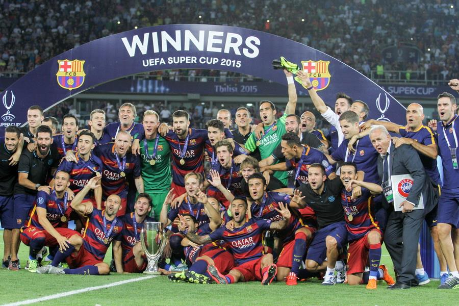 Нагородження переможців матчу за Суперкубок УЄФА 2015 року у Тбілісі. Грузія